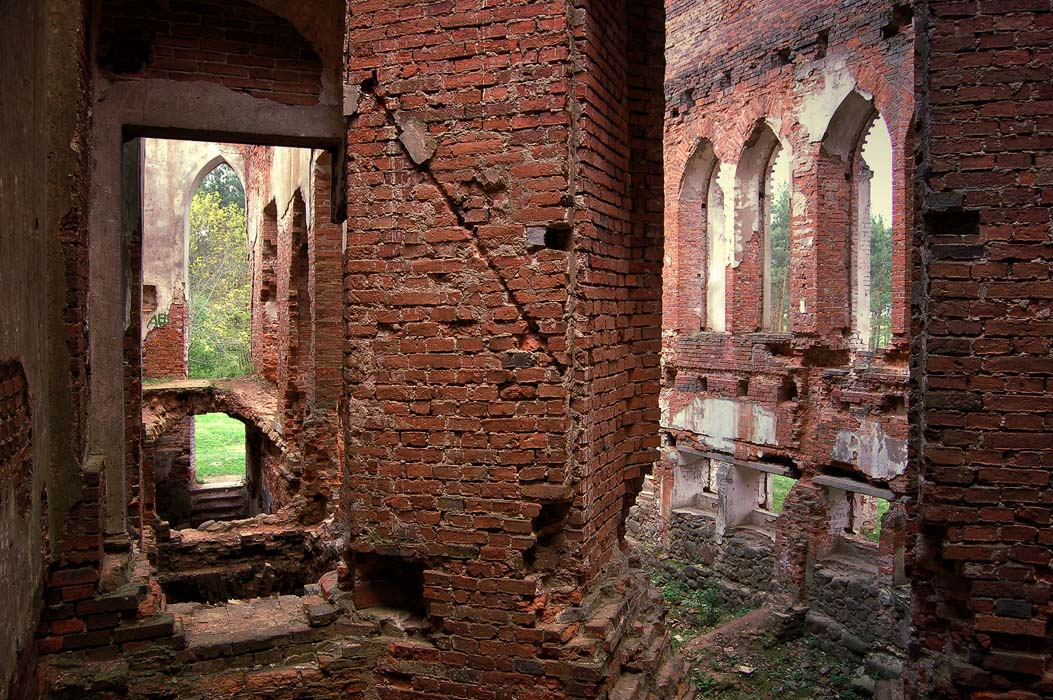 Беларуская (тарашкевіца): Косаўскі палацава-паркавы ансамбль: рэшткі былога палацу Пуслоўскіхмэмарыяльны музэй-сядзіба Т. Касьцюшкіфрагмэнты парку. г. Косава This is a photo of Belarusian heritage monument. Reference number: 111Г000305 ( WLM)